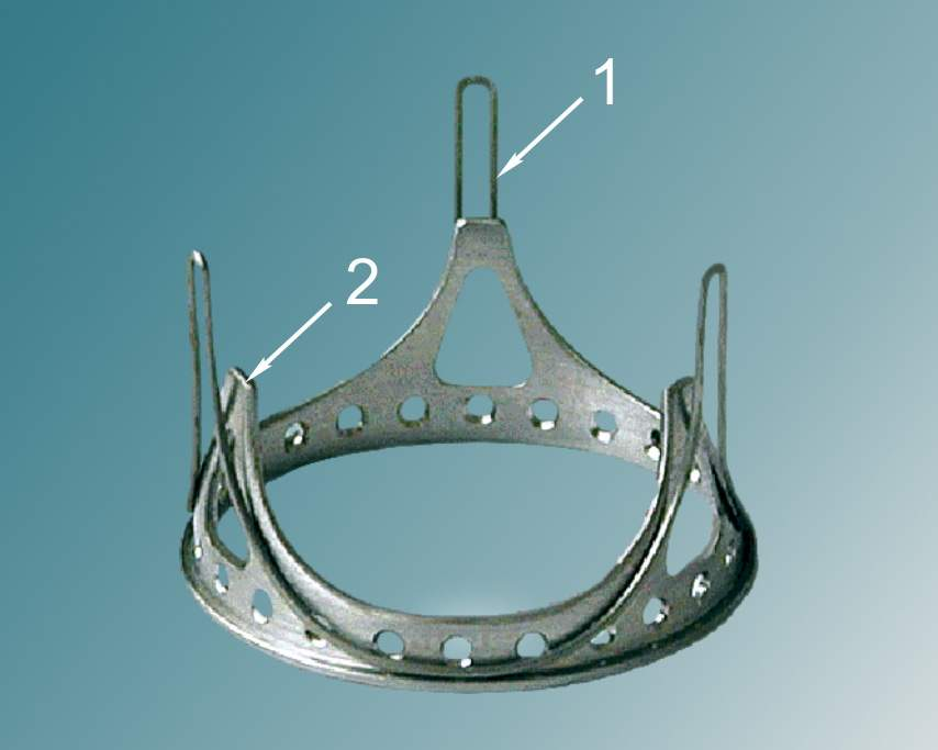 Каркас искусственного биологического клапана сердца